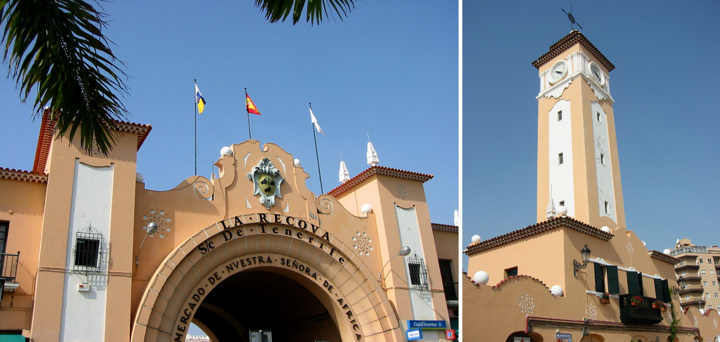 Mercado Nuestra Señora de África, Santa Cruz de Tenerife. Fachada y torre.